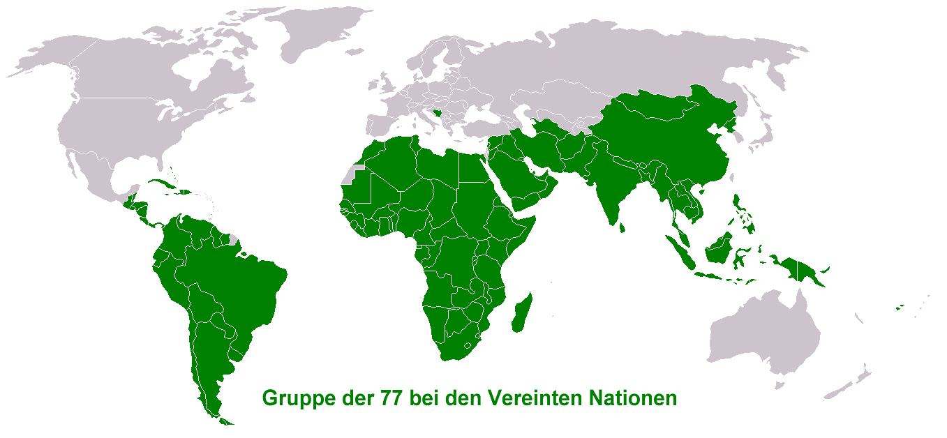 Karte zu den Mitgliedsländern der Gruppe 77 bei den Vereinten Nationen